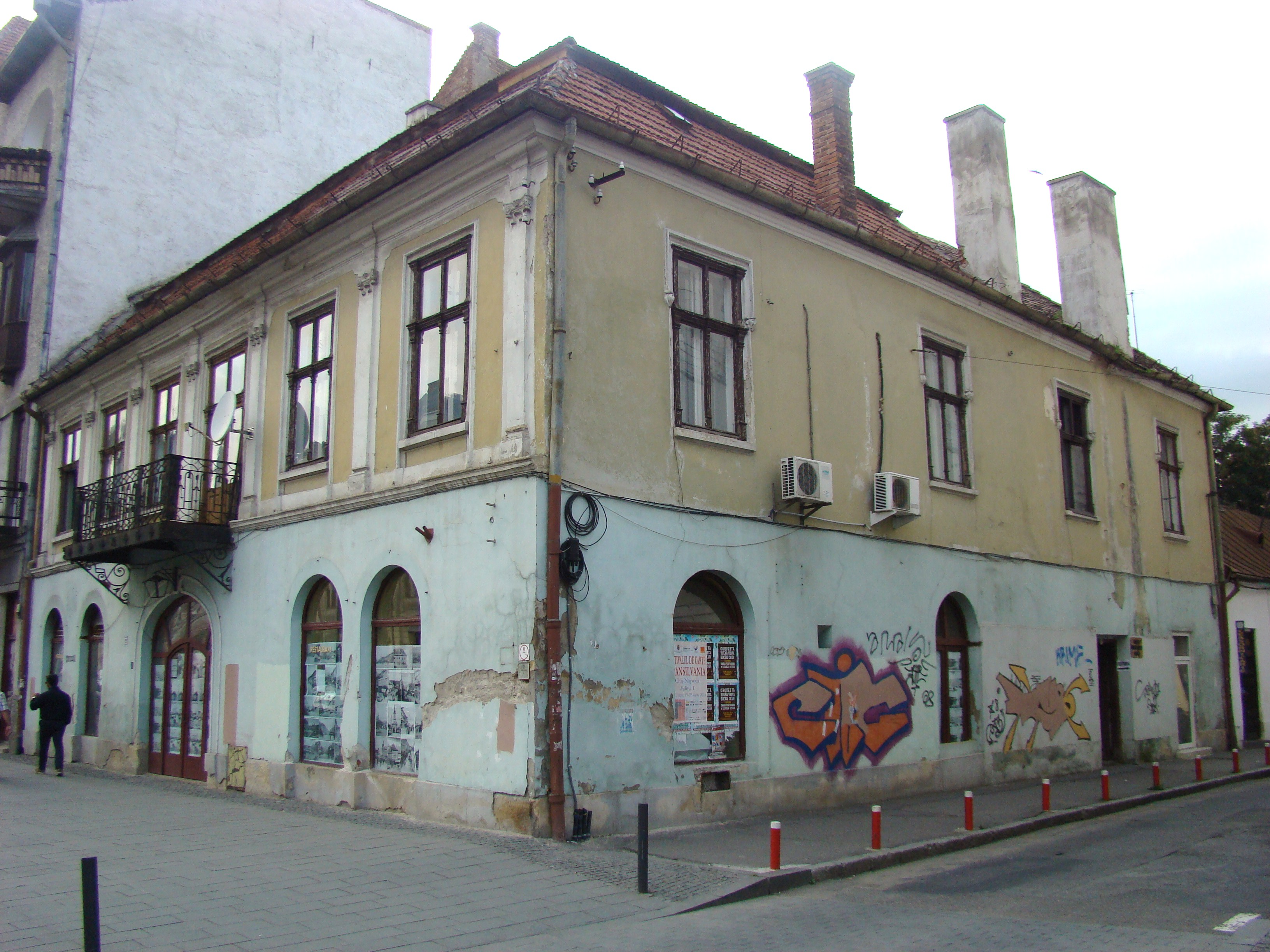 Casă mnument istoric Baba Novac, colț cu Eroilor